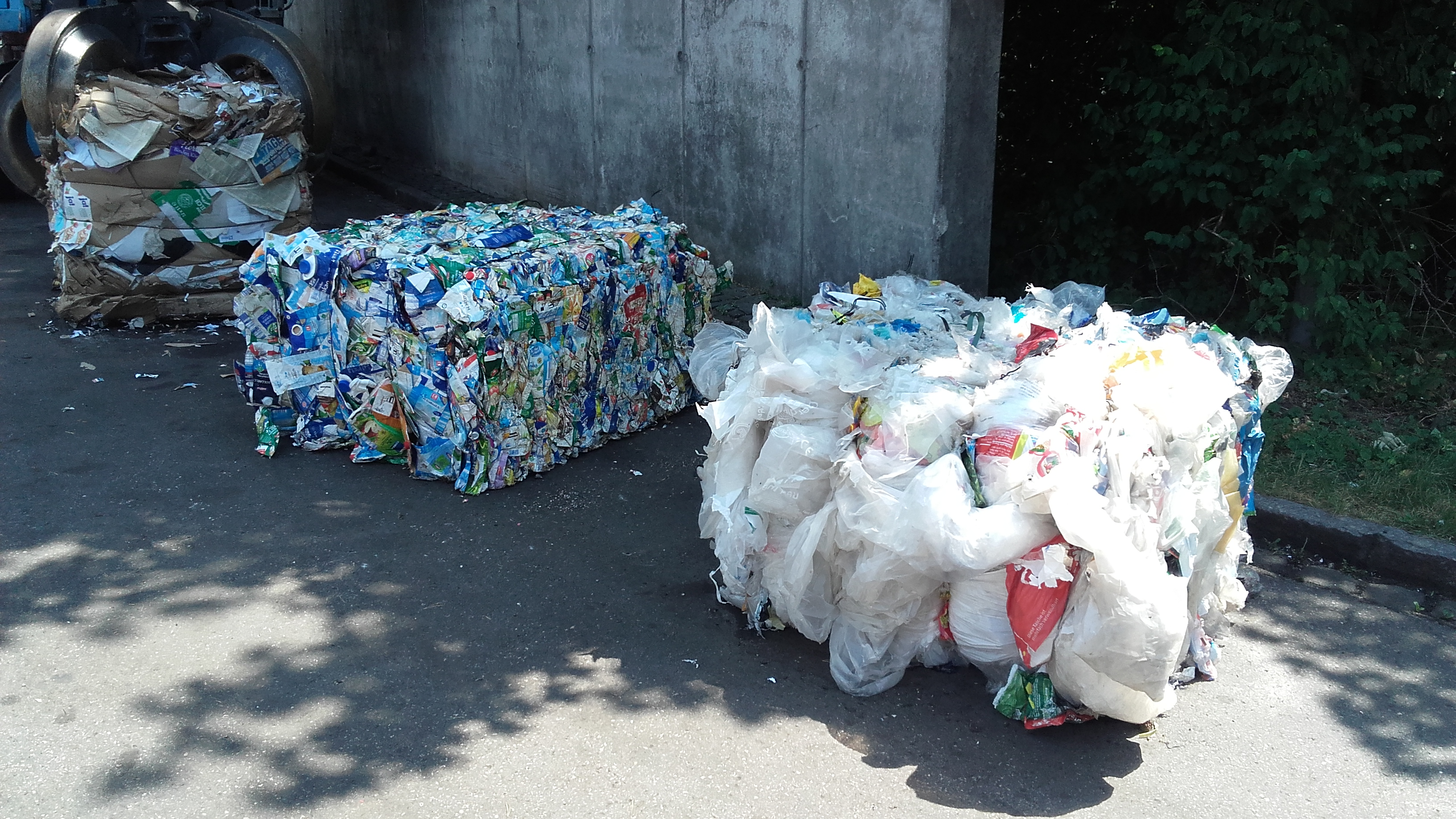 Wertstoffballen als Produkt der Sortieranlage